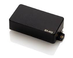 Pastillas EMG caracteristicas de la kelly KEXMG